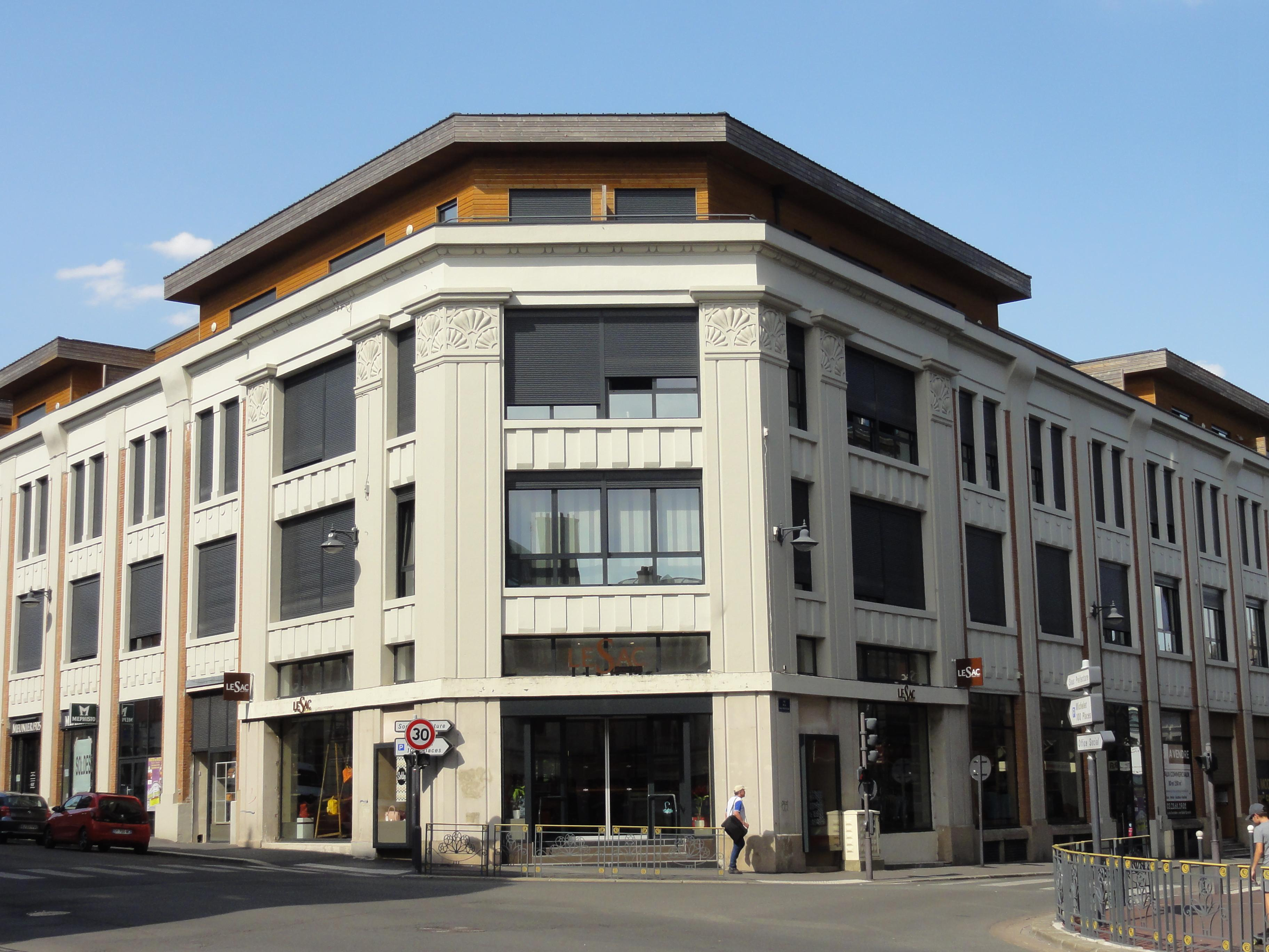 Architecture Art Déco à Saint-Quentin - voir le titre du fichier.